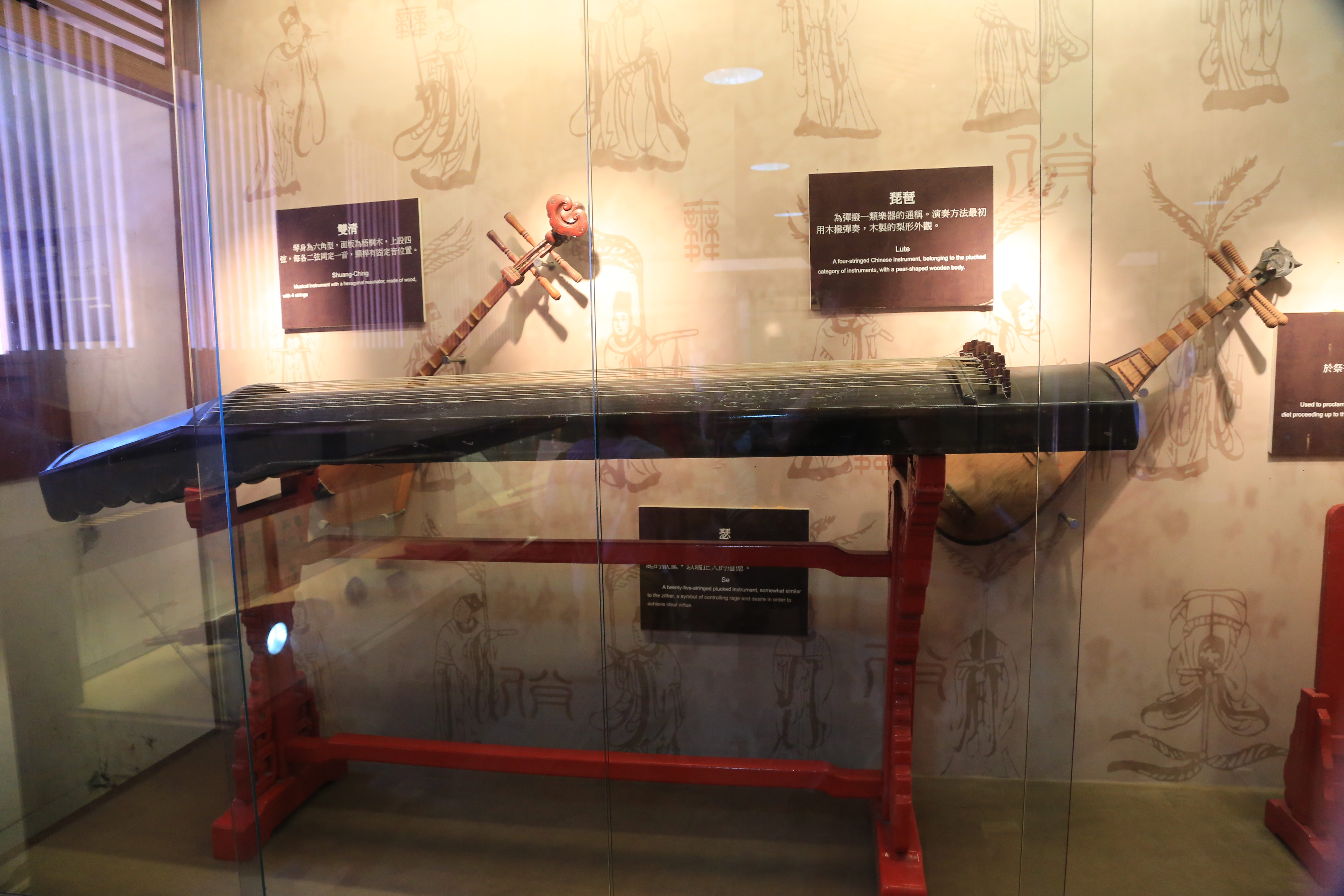 台南市孔廟文物收藏 樂器瑟 雙清 [Shuang-Ching] 琴身為六角型、面板為悟桐木、上設四弦、毎各二弦同定一音、頸桿有固定音位置。 Musical instrument with a hexagonal resonator, made of wood, with 4 strings. 琵琶 [Pípa] (Lute) 為彈撥一類樂器的通稱。演奏方法最初用木撥彈奏、木製的梨形外勸。 A four-stringed Chinese instrument, belonging to the plucked category of instruments, with a pear-shaped wooden body. 瑟 [Sè] …… 起的慾望、以端正人的道徳。 A twenty-five-stringed plucked instrument, somewhat similar the zither, a symbol of controlling rage and desire in order to achieve ideal virtue.